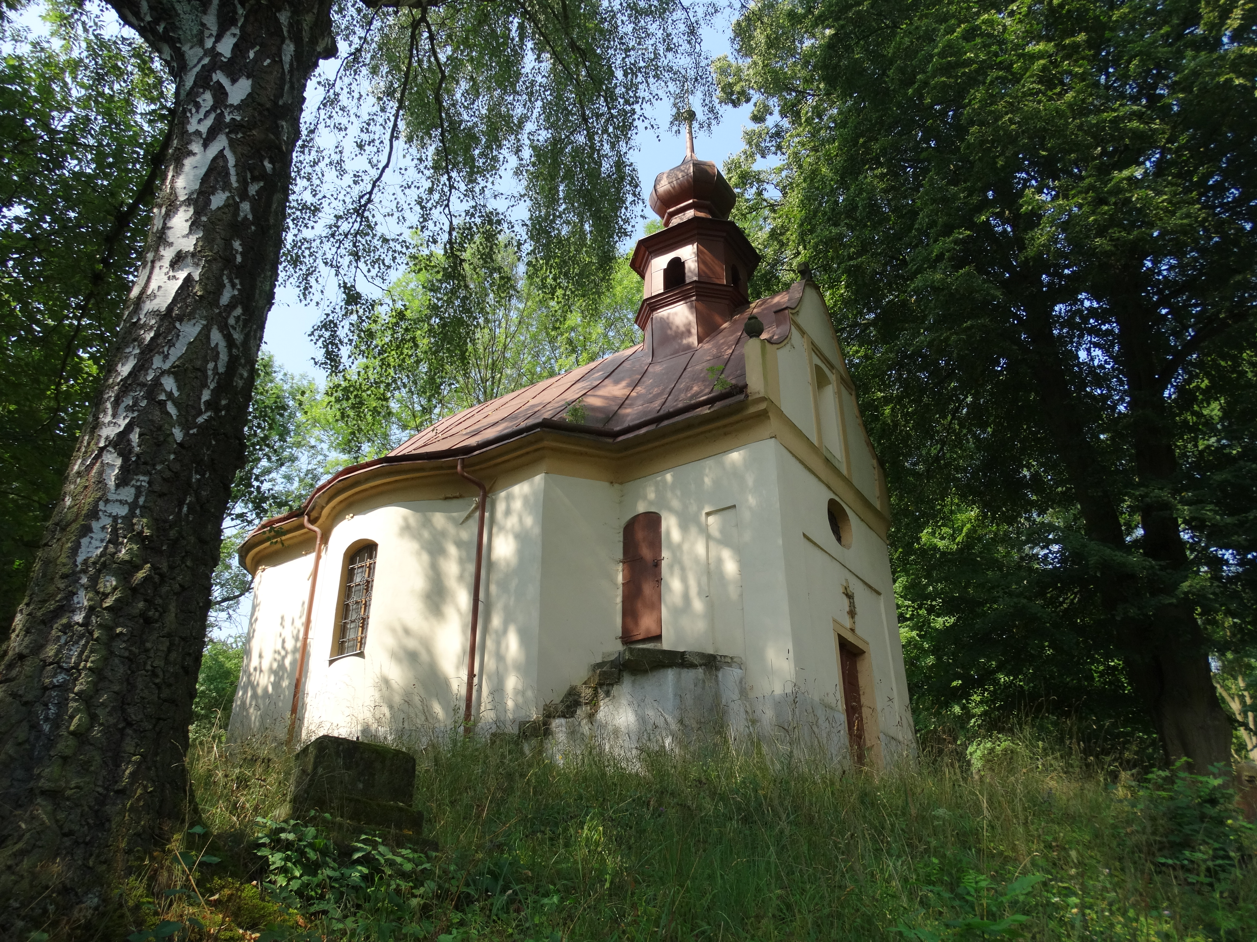 kaple